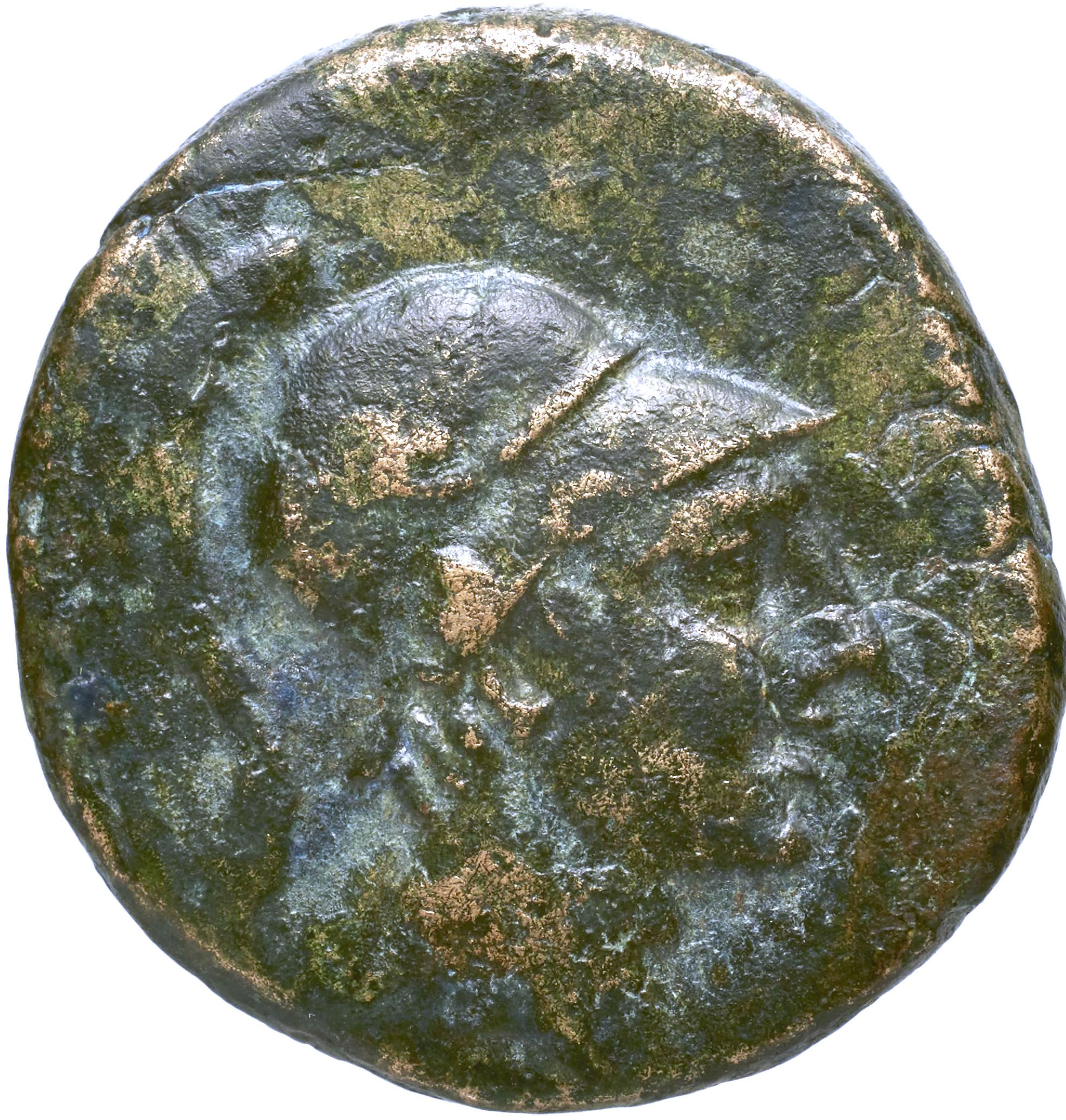 Monnaie de Pont Amisos, droit. Bronze ; 8,11 g.